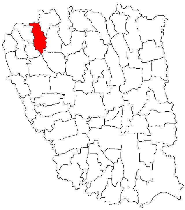 Categorie:Hărţi ale judeţului Galaţi